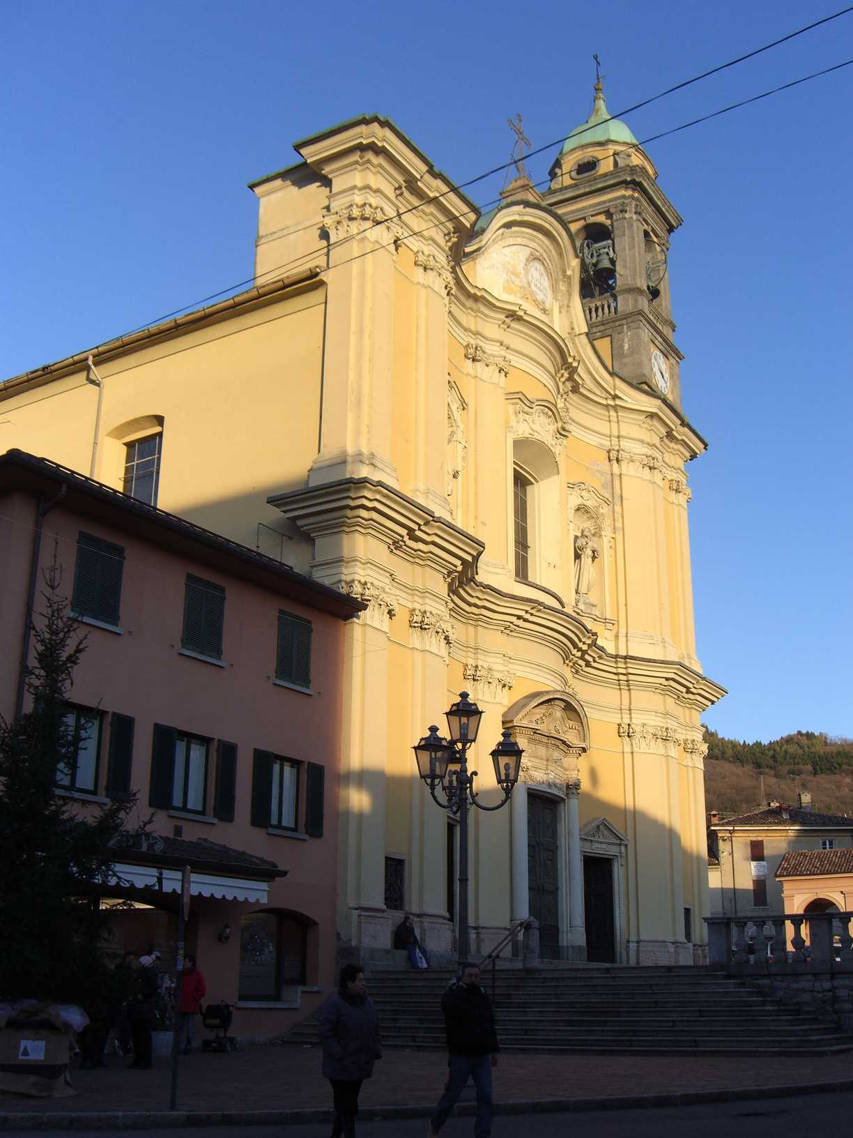 Canzo chiesa di Santo Stefano facciata